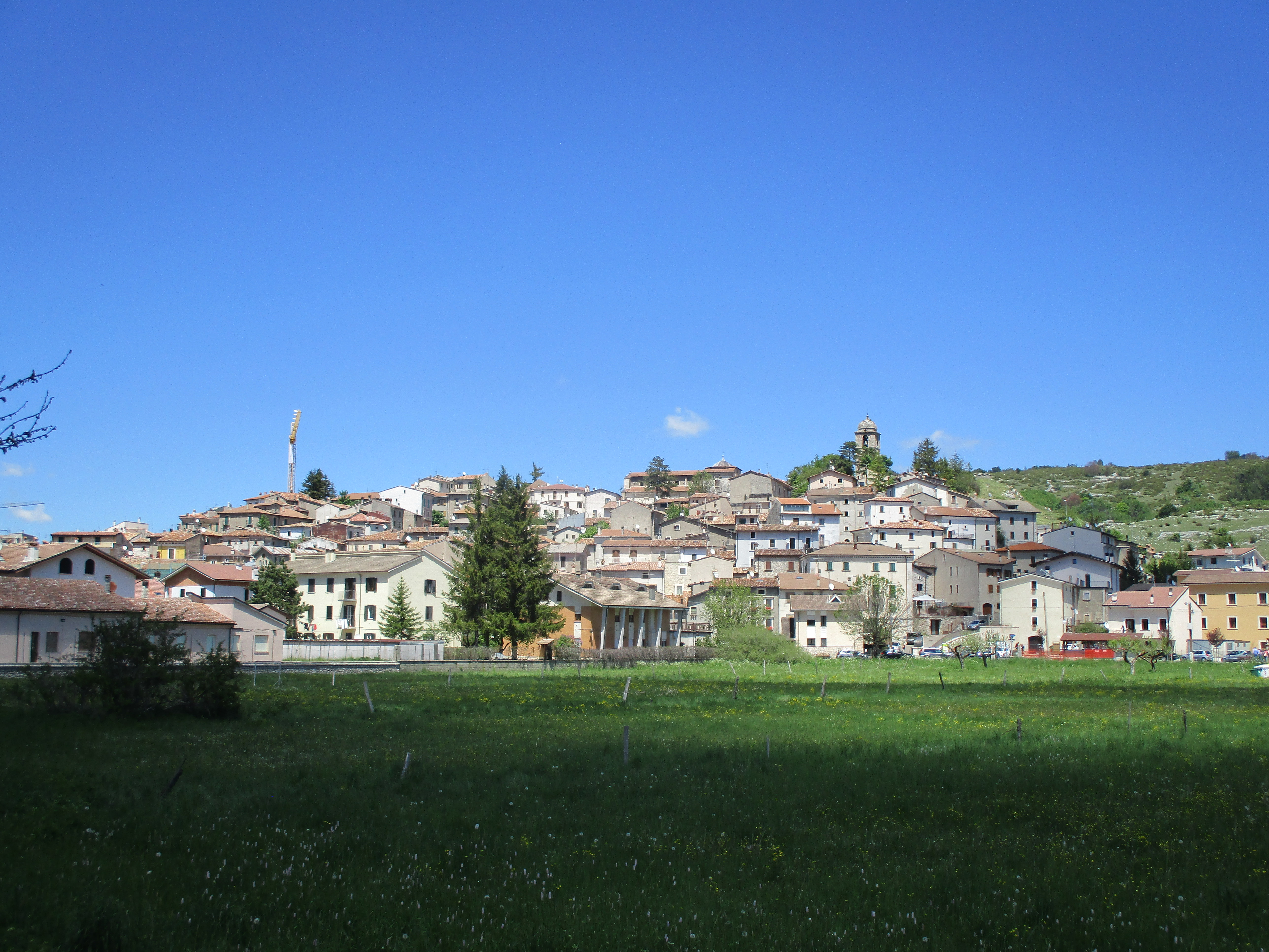 Panoramica di Rocca di Mezzo